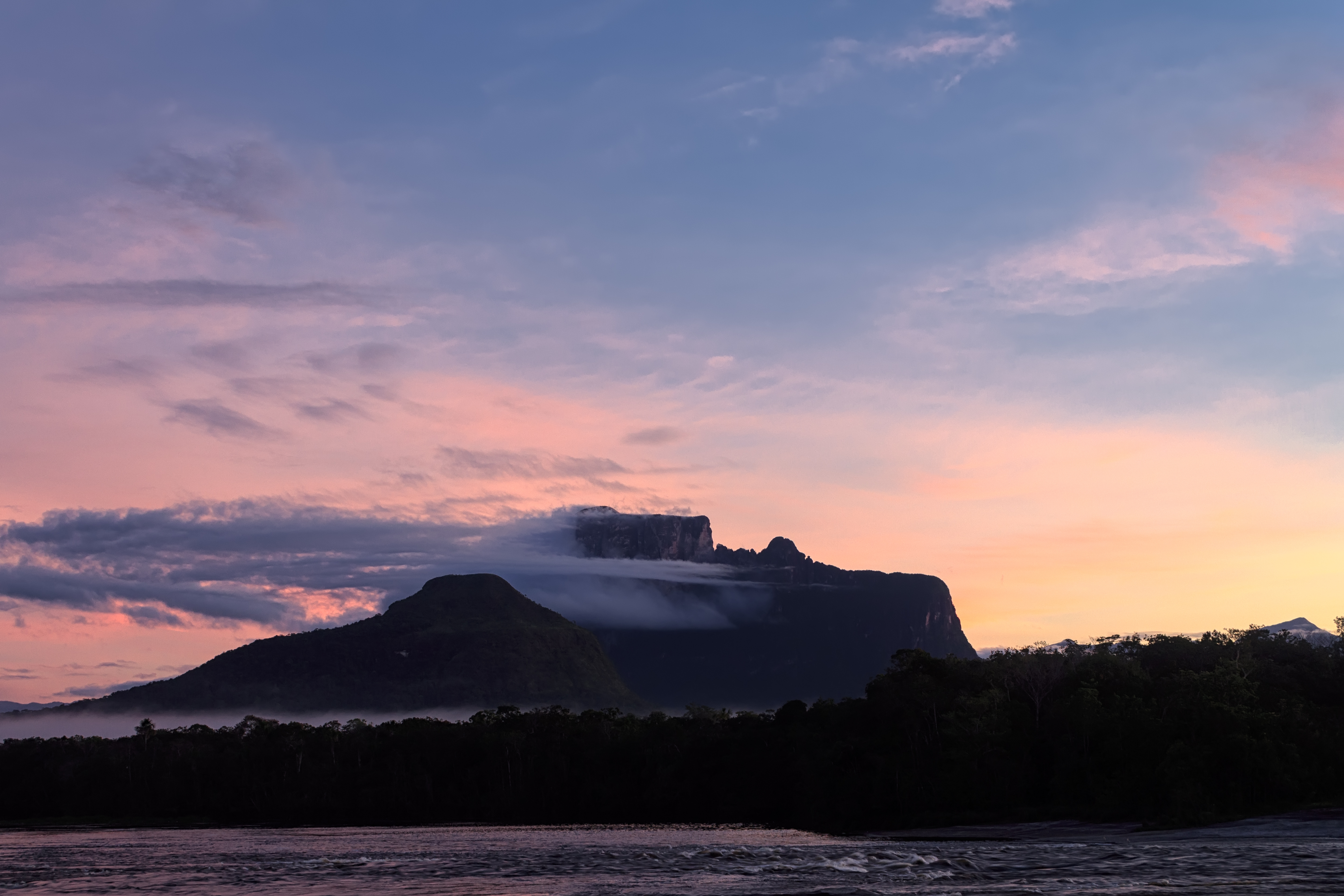 Sunrise at Autana | Amanecer en el Autana